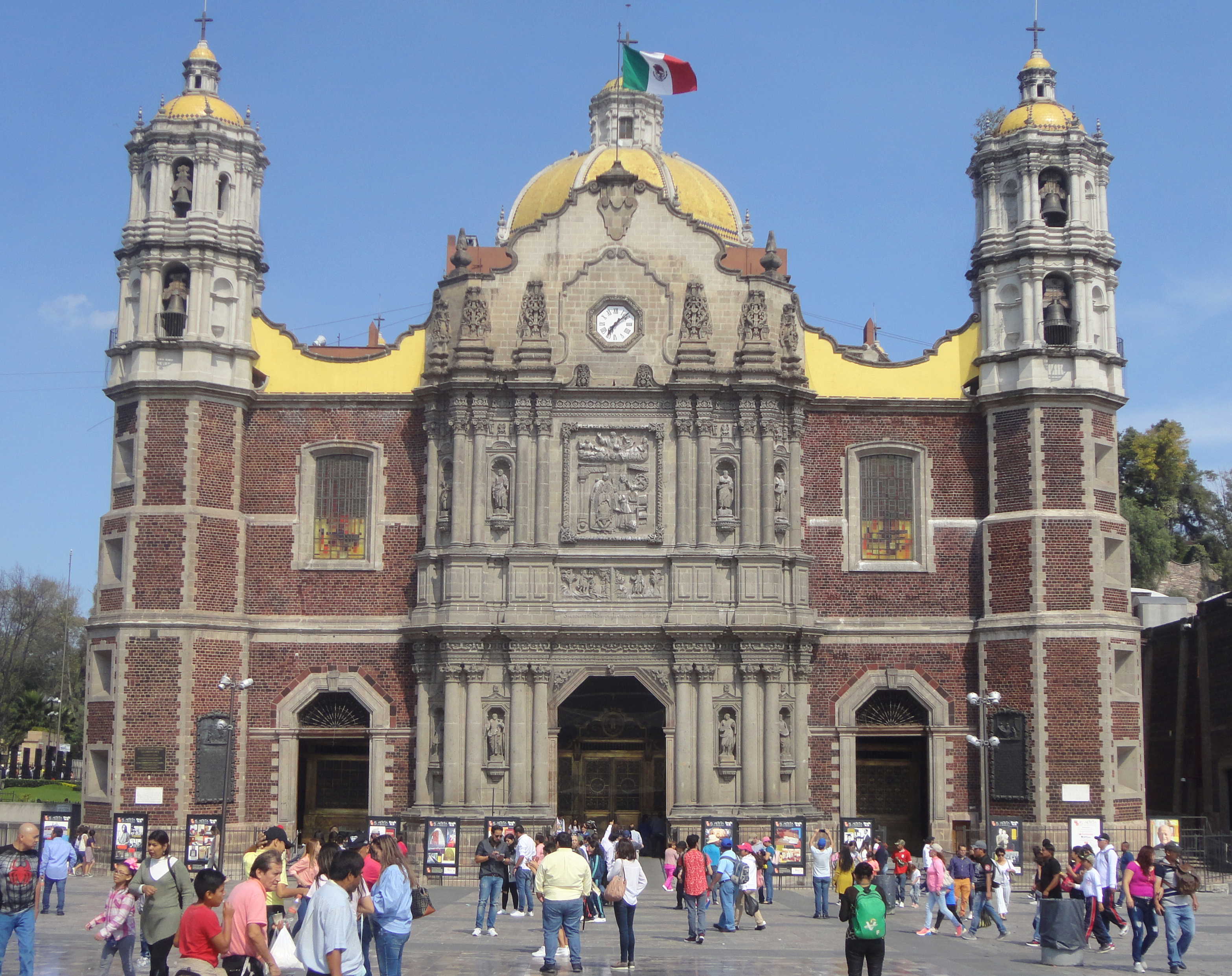 Templo Expiatorio a Cristo Rey (Antigua Basílica de Guadalupe), Ciudad de México.